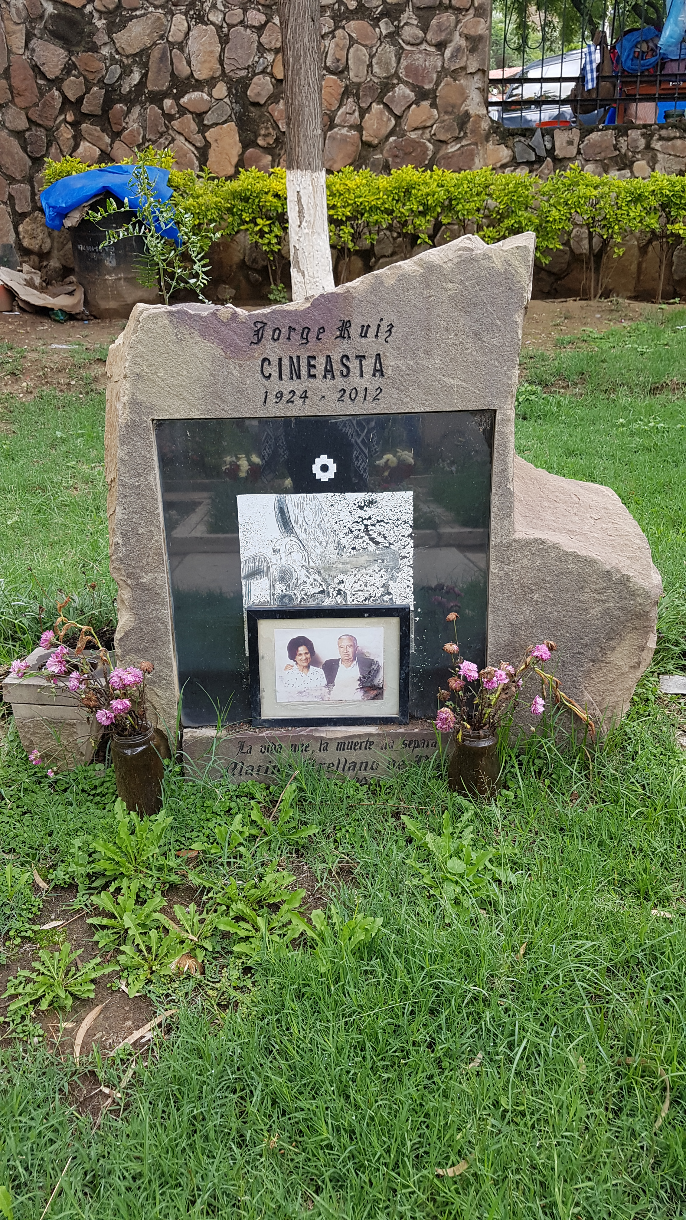 Cementerio General de Cochabamba 2012 Jorge Ruiz 8 This medium shows the protected monument with the number C/F0-001 in Bolivia.